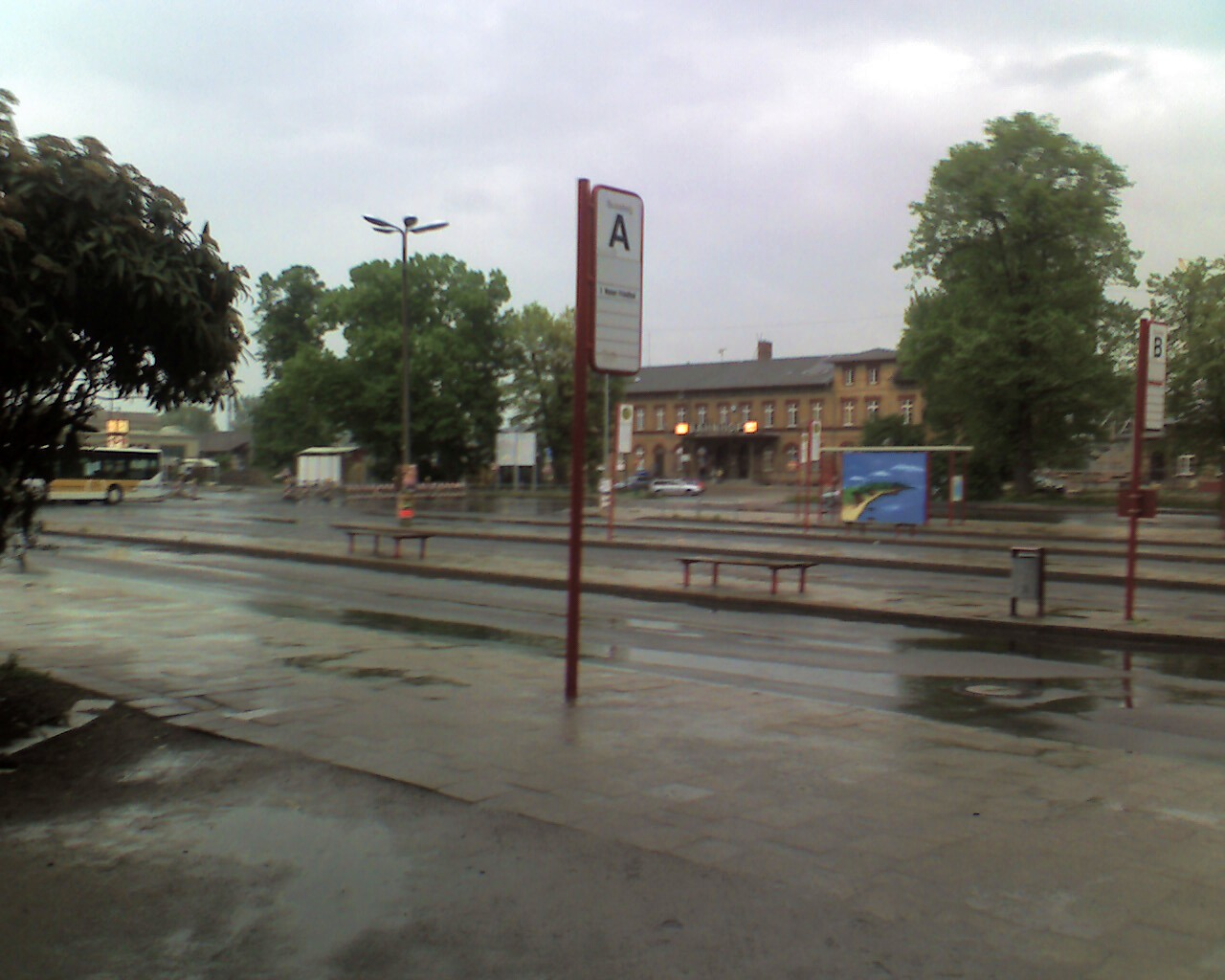 Busbahnhof Greifswald - Blick zum Hauptbahnhof